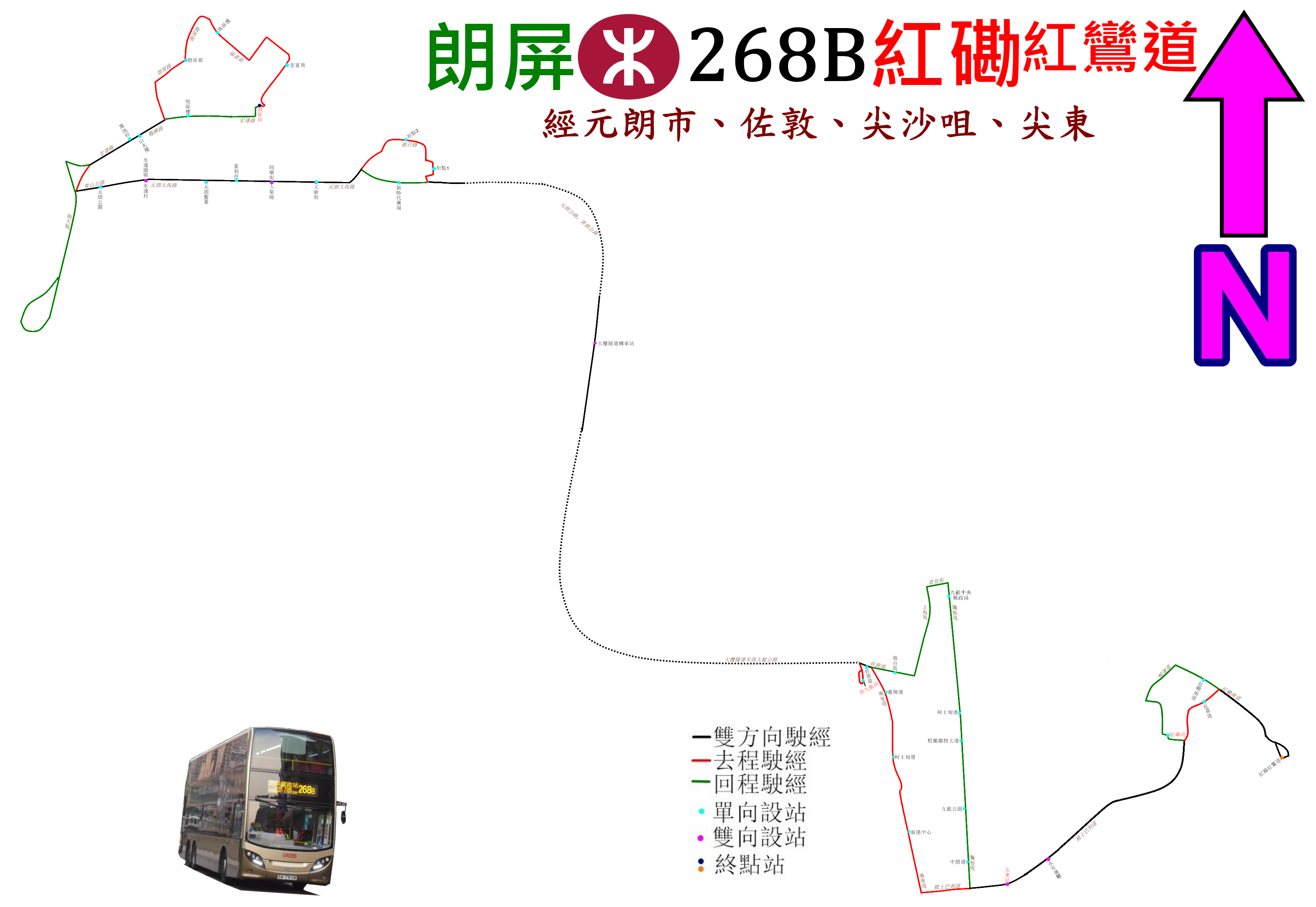 中文（香港）: 九巴268B線的走線圖